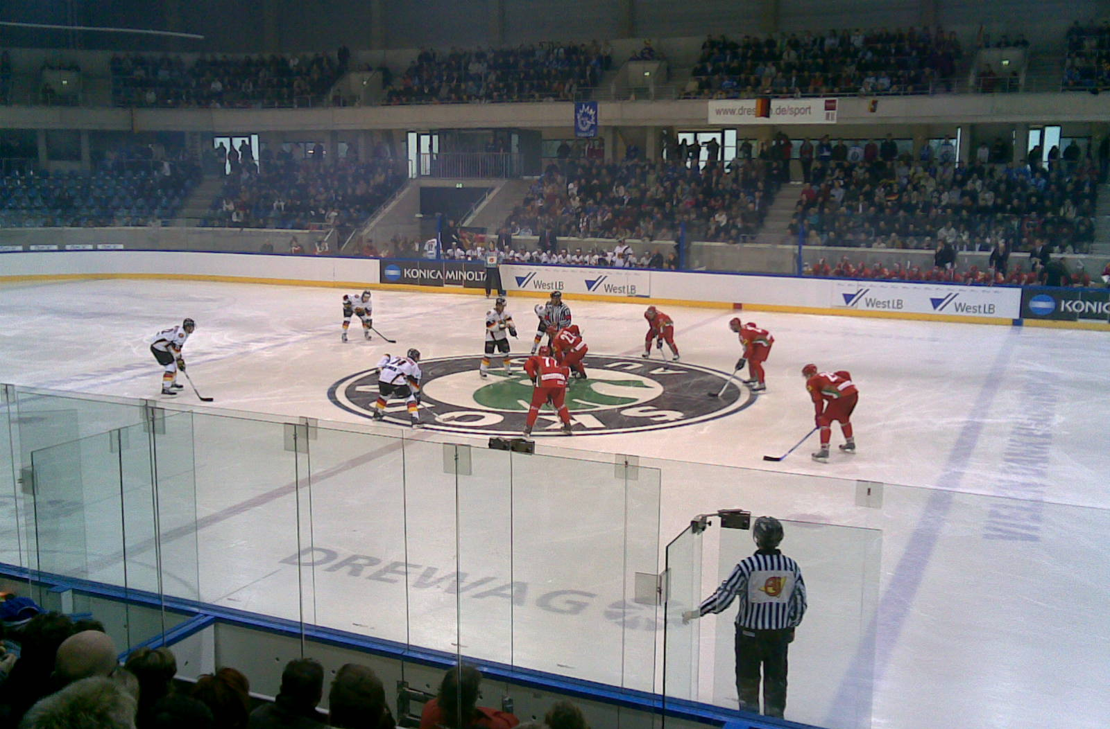 Freiberger Arena, Dresden: WM-Vorbereitungsspiel Deutschland-Weißrussland am 21.April 2008